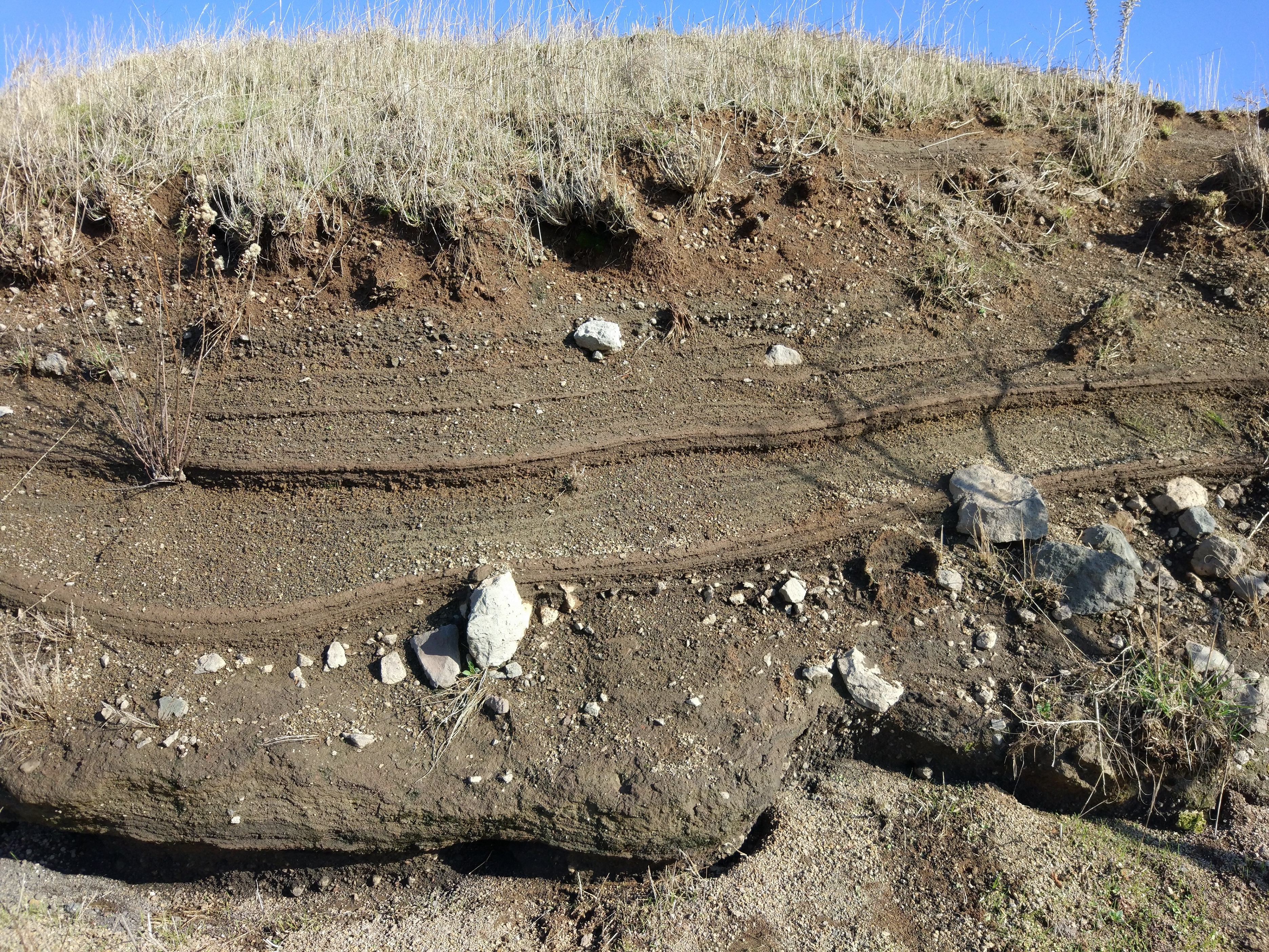 שכבות טוף בקצה המערבי של הר אביטל